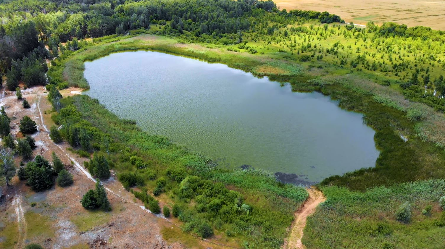 Озеро Варги (Варяги), розташоване з західної сторони села Савин Чернігівської обл. Таку назву село одержало через давні поселення варягів навколо нього.